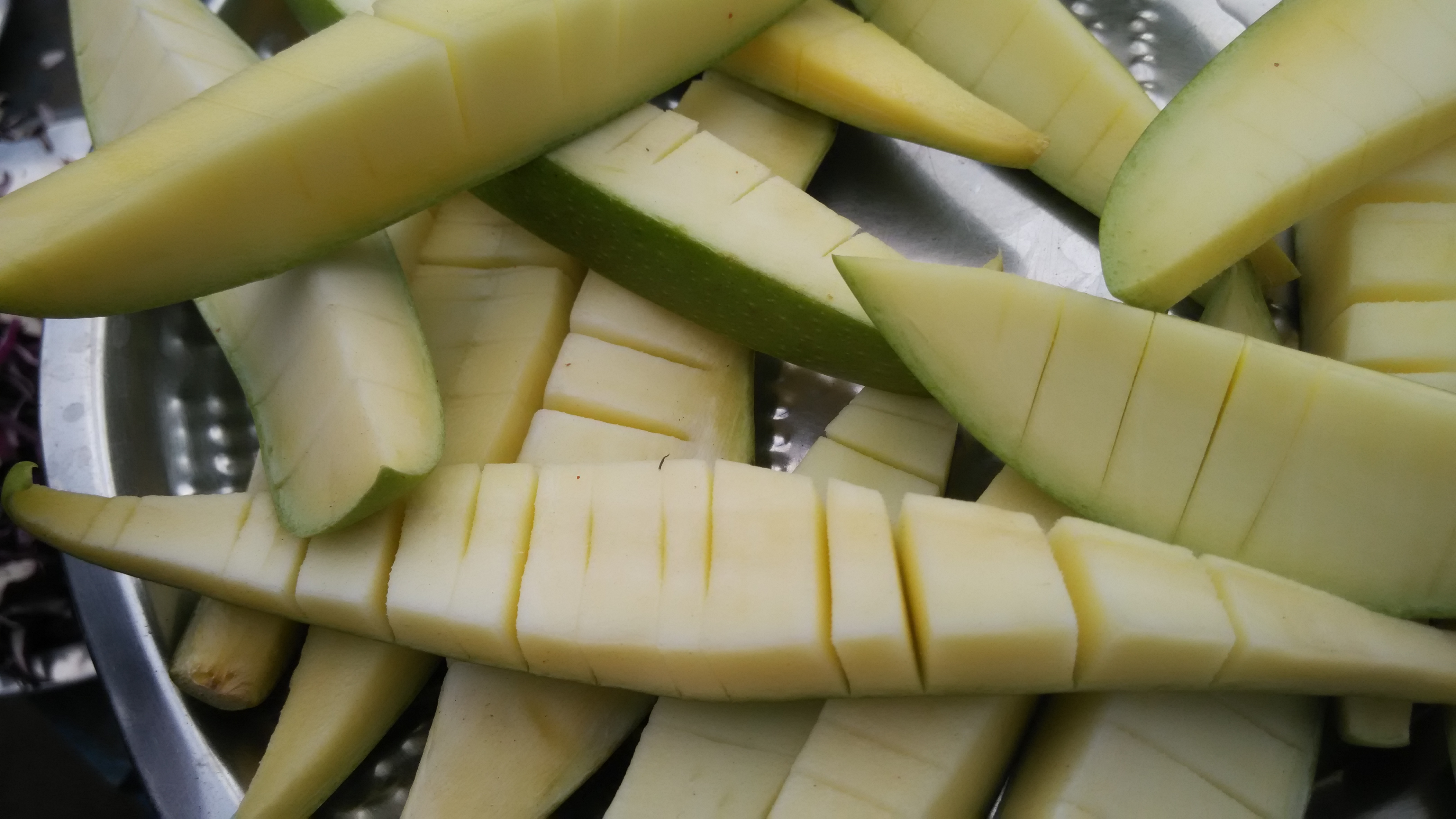 மாங்காய் துண்டுகள்.